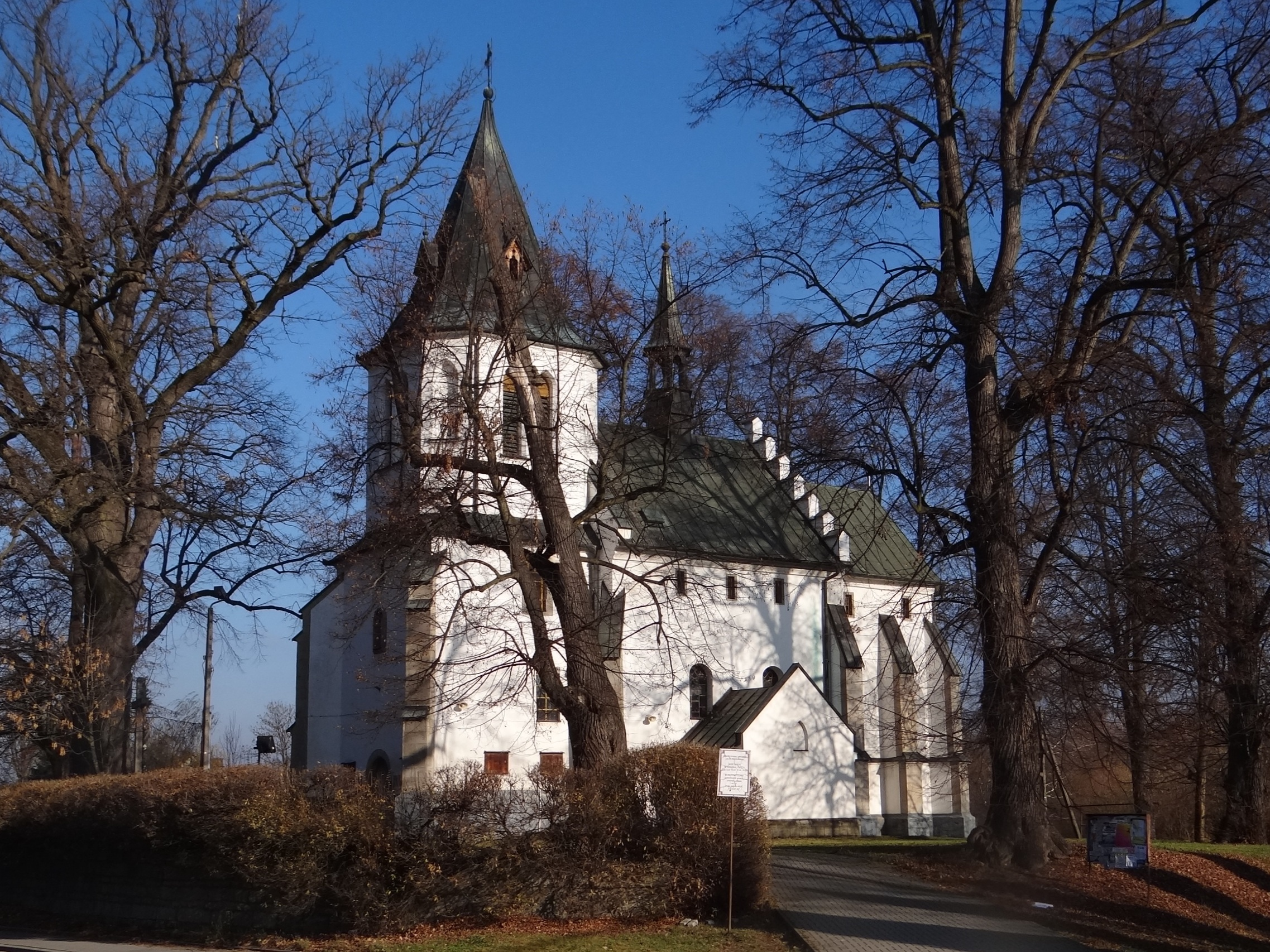 Saint Martin church in Gnojnik